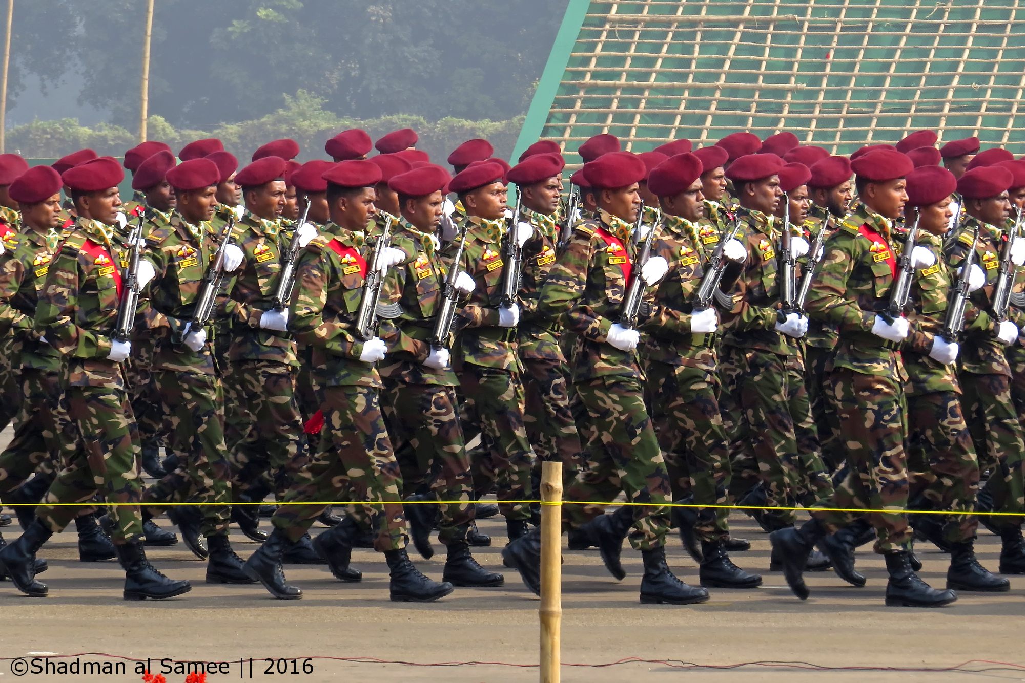 VGTJ/VDP 2016.